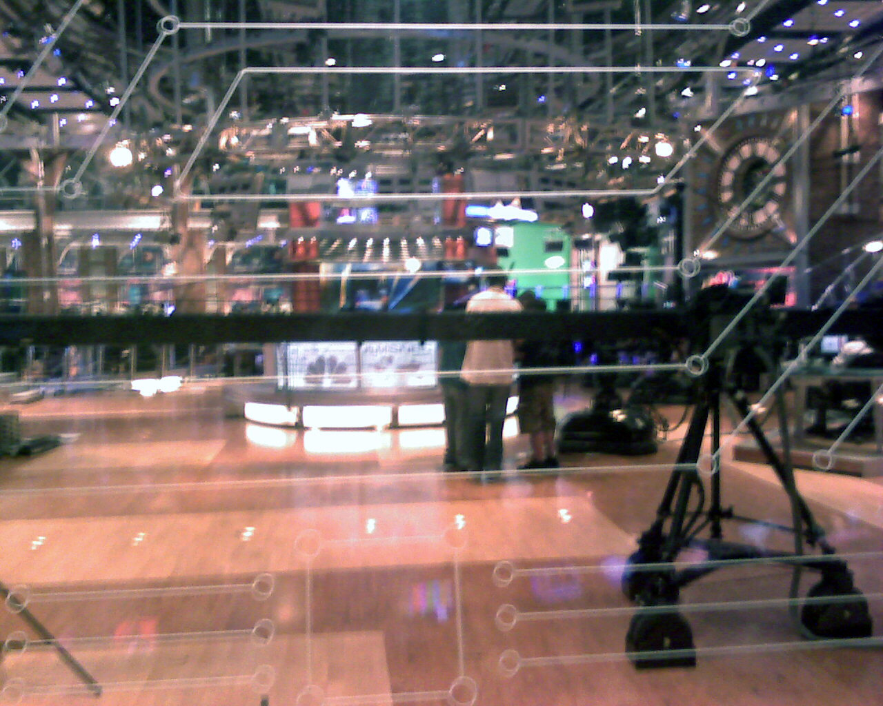 MSNBC NJ HQ